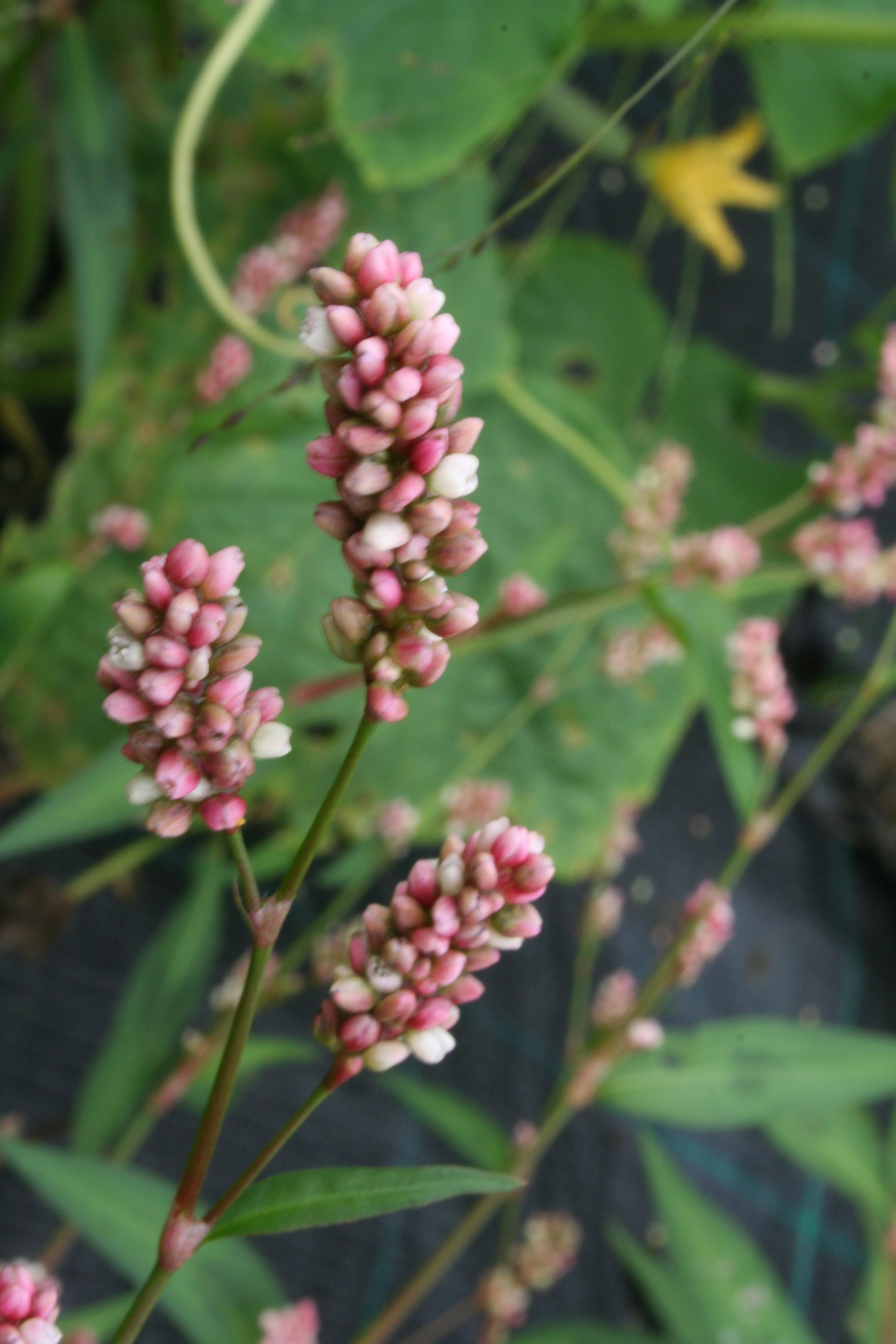 Persicaria_maculosa (sinonimo Polygonum persicaria) Località Villa Prima, Limana (BL), quota 350 m s.l.m.